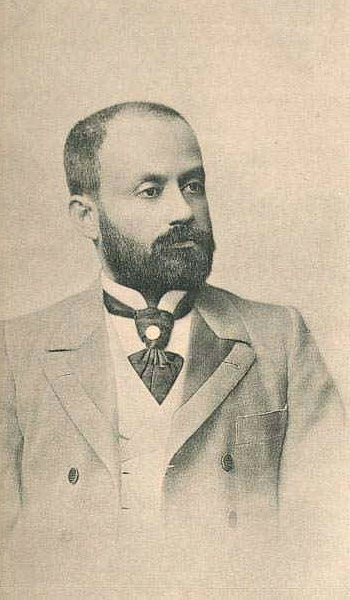 Portrait of Cipriano Castro (1858-1924)